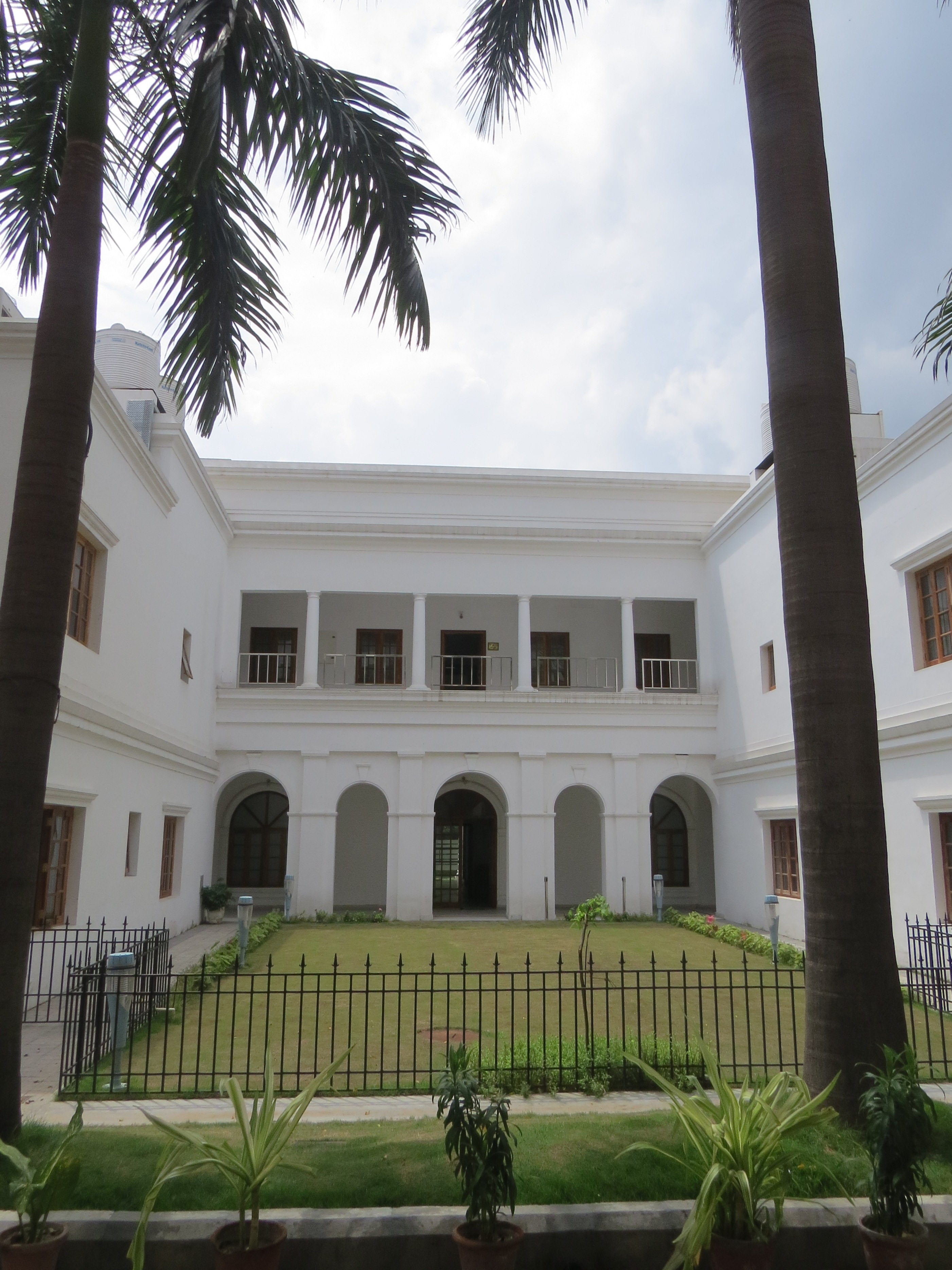 Photos taken during WCI, Chandigarh 2016